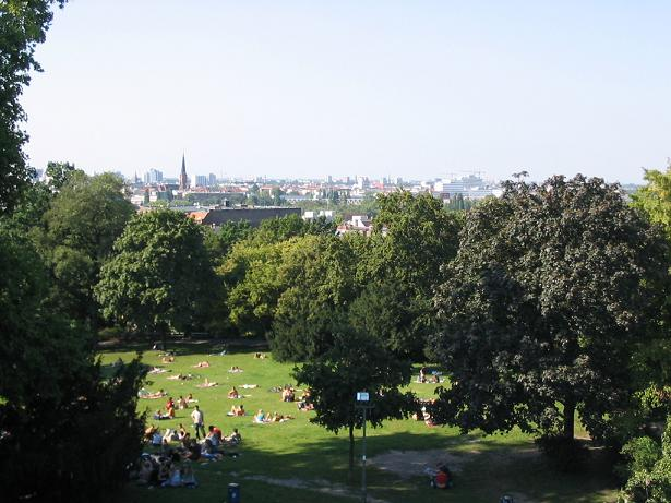 Blick vom Teltownordhang = Kreuzberg über Berlin - Der Blick geht Richtung Potsdamer Platz